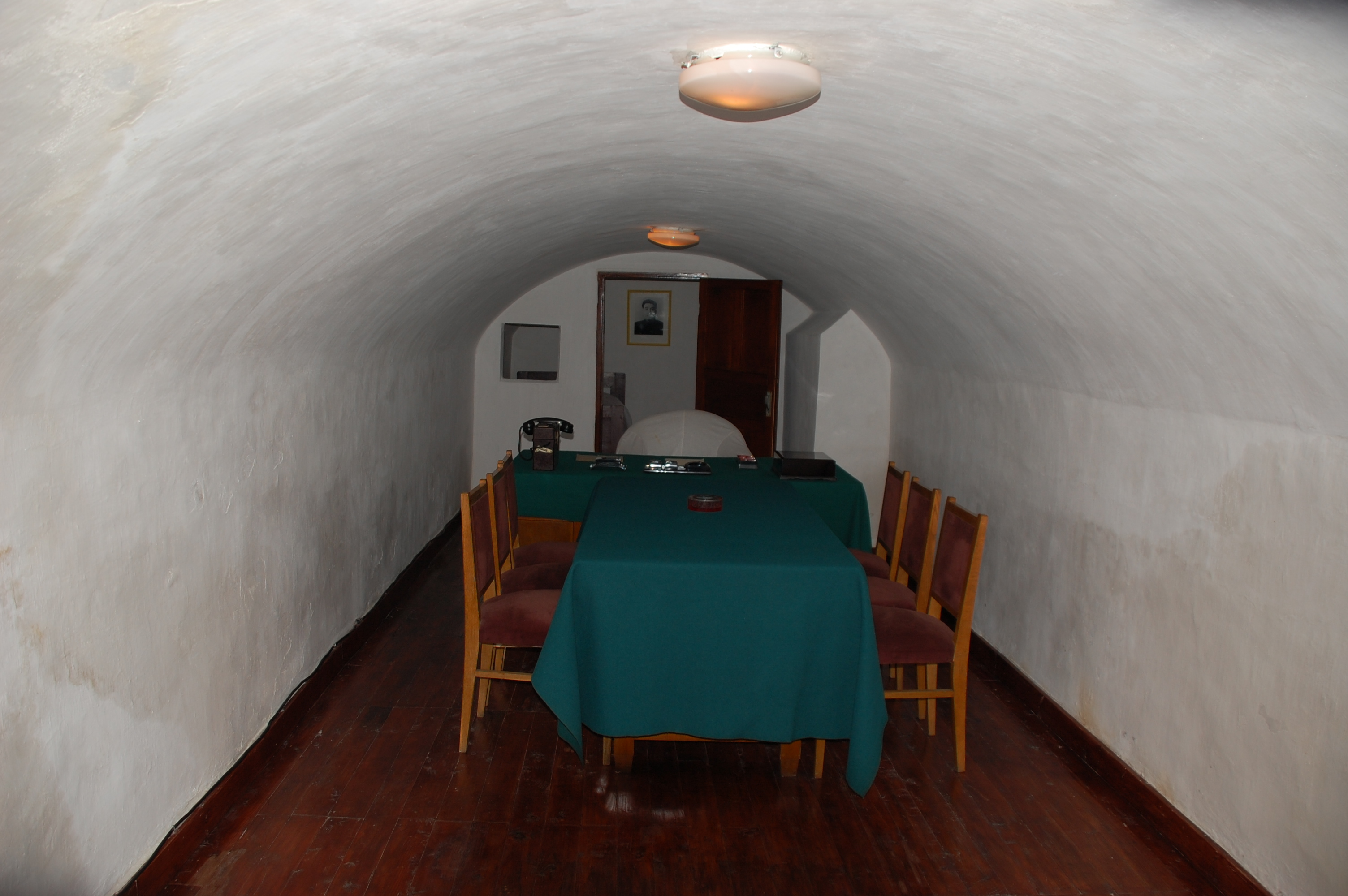 North Korea — Pyongyang